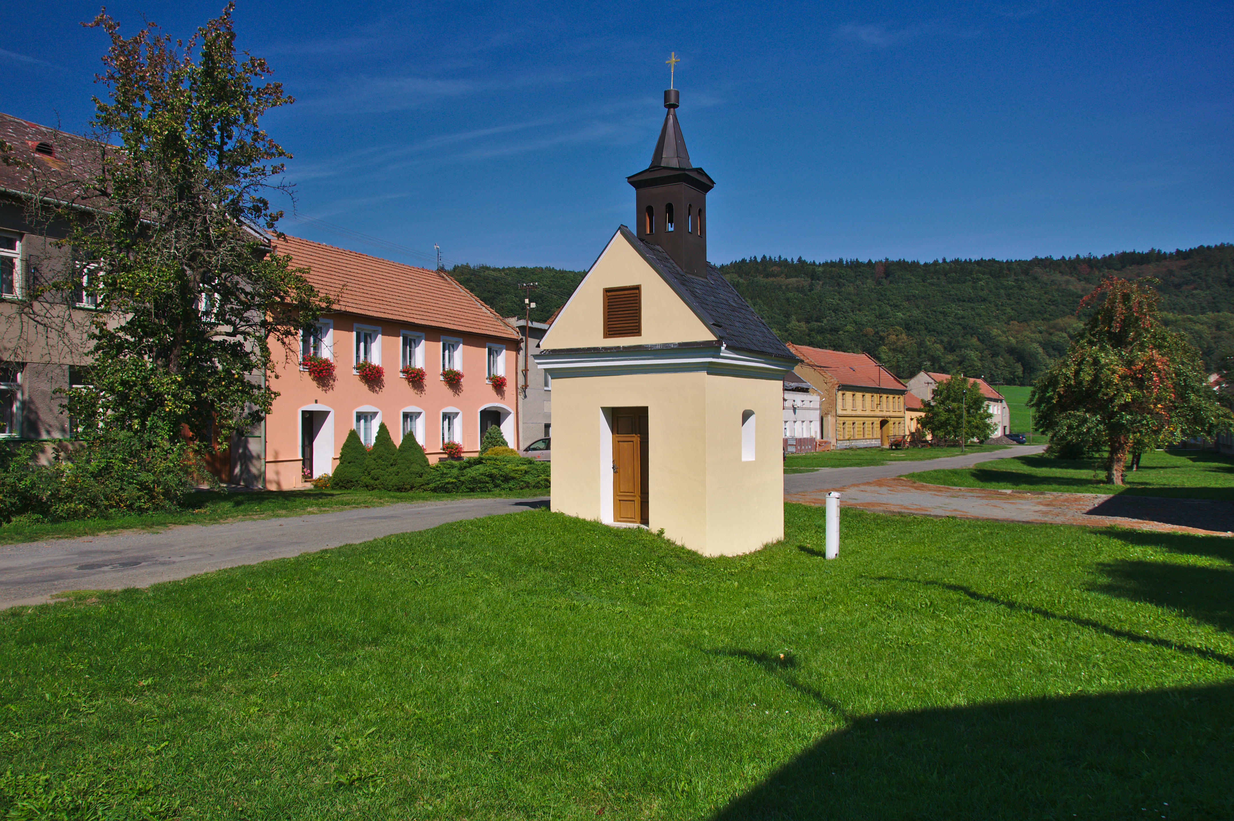 Kaple svatého Martina, Služín, Stařechovice, okres Prostějov